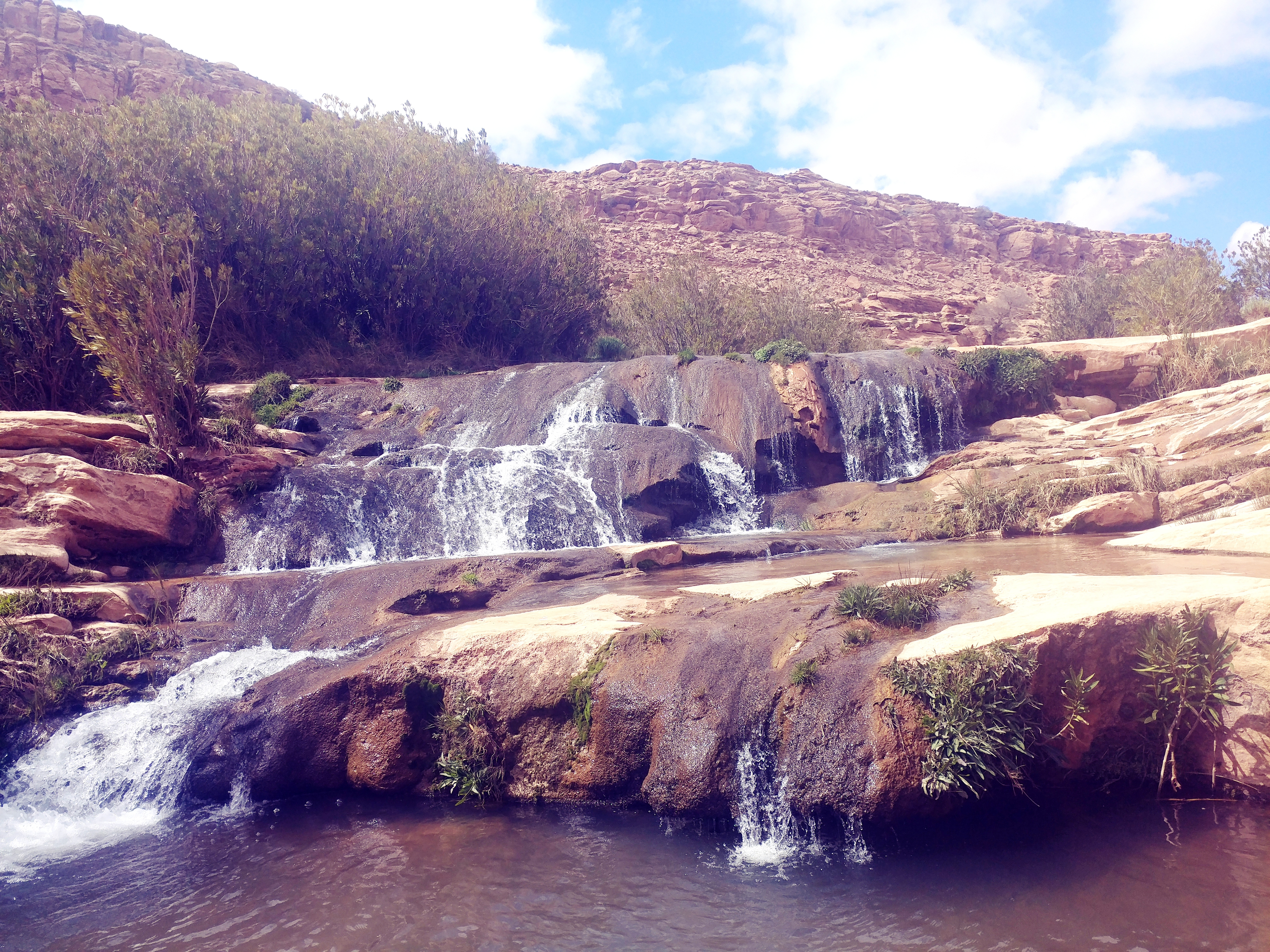 هذه صورة لمنظر طبيعي من تاويالة بالأغواط